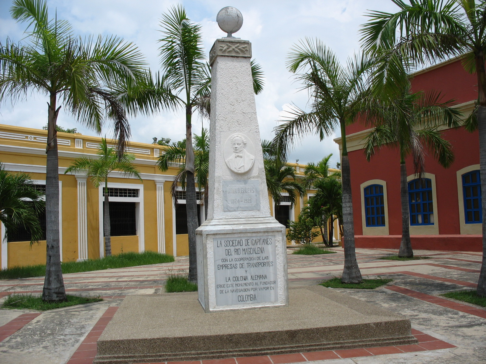 Monumento a Juan B. Elbers